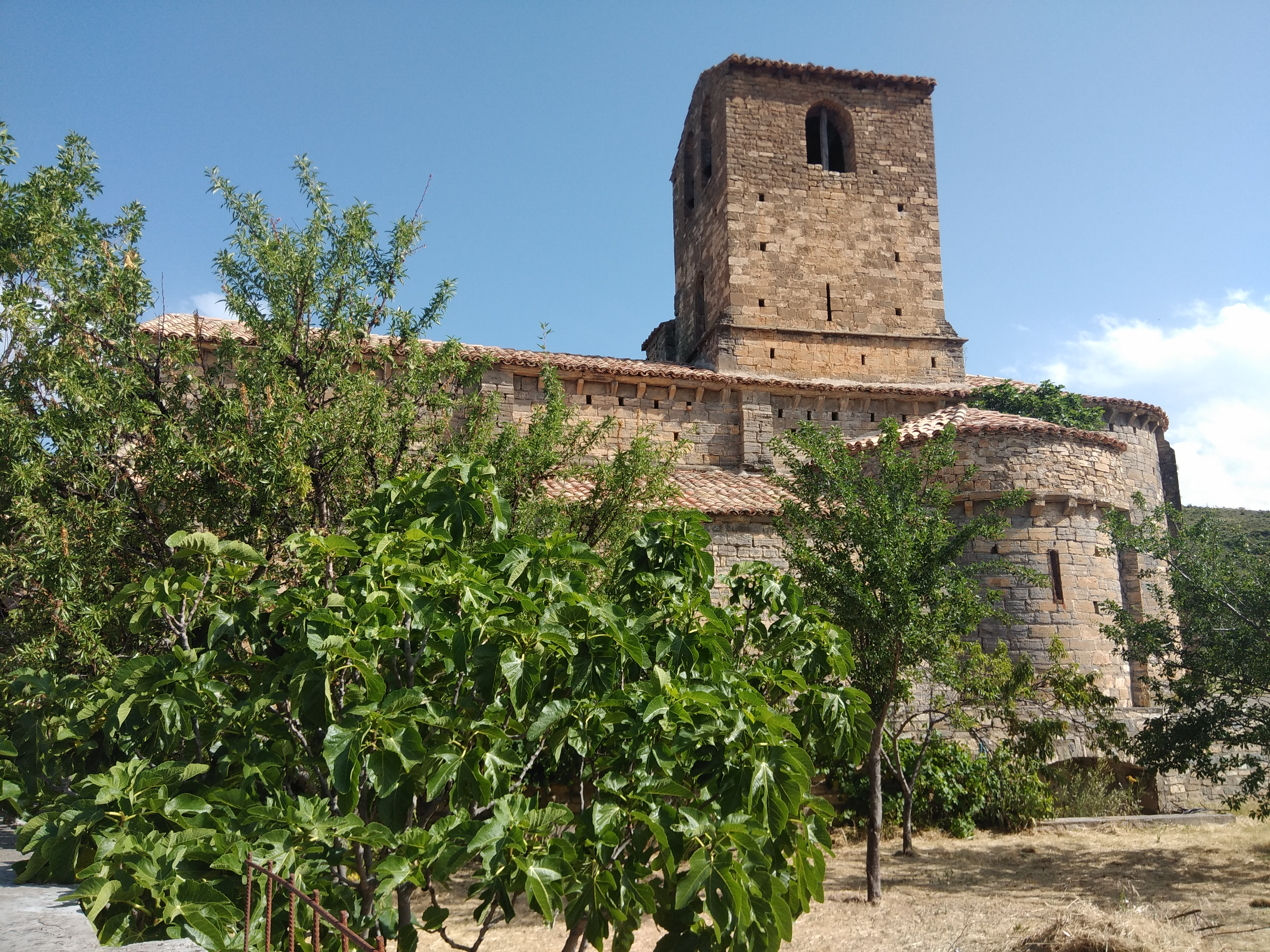 Majones, Huesca, España, parroquia del Salvador, siglo XII, románico